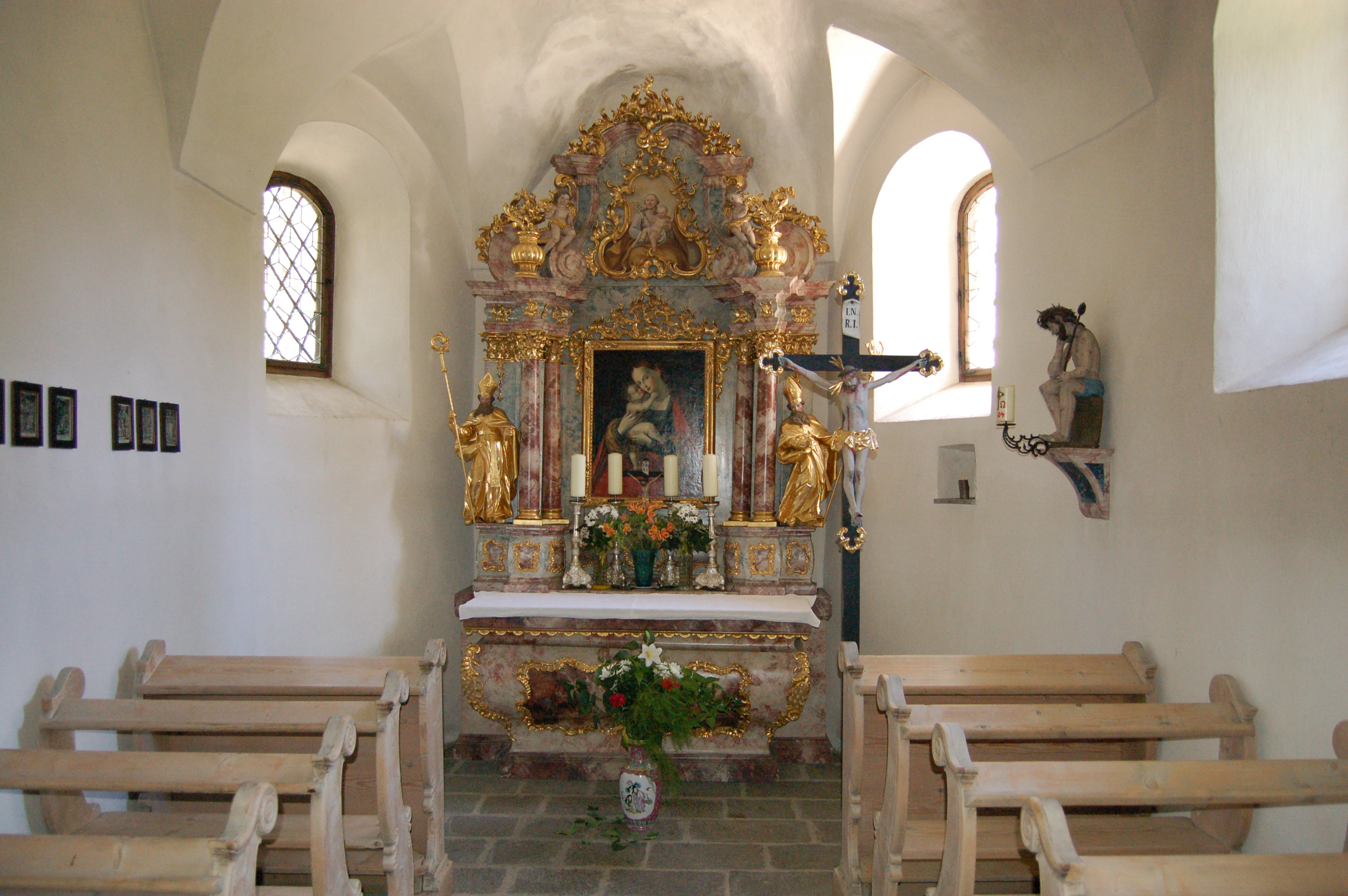 Klaunzkapelle in der Fraktion Klaunz (Gemeinde Matrei in Osttirol)